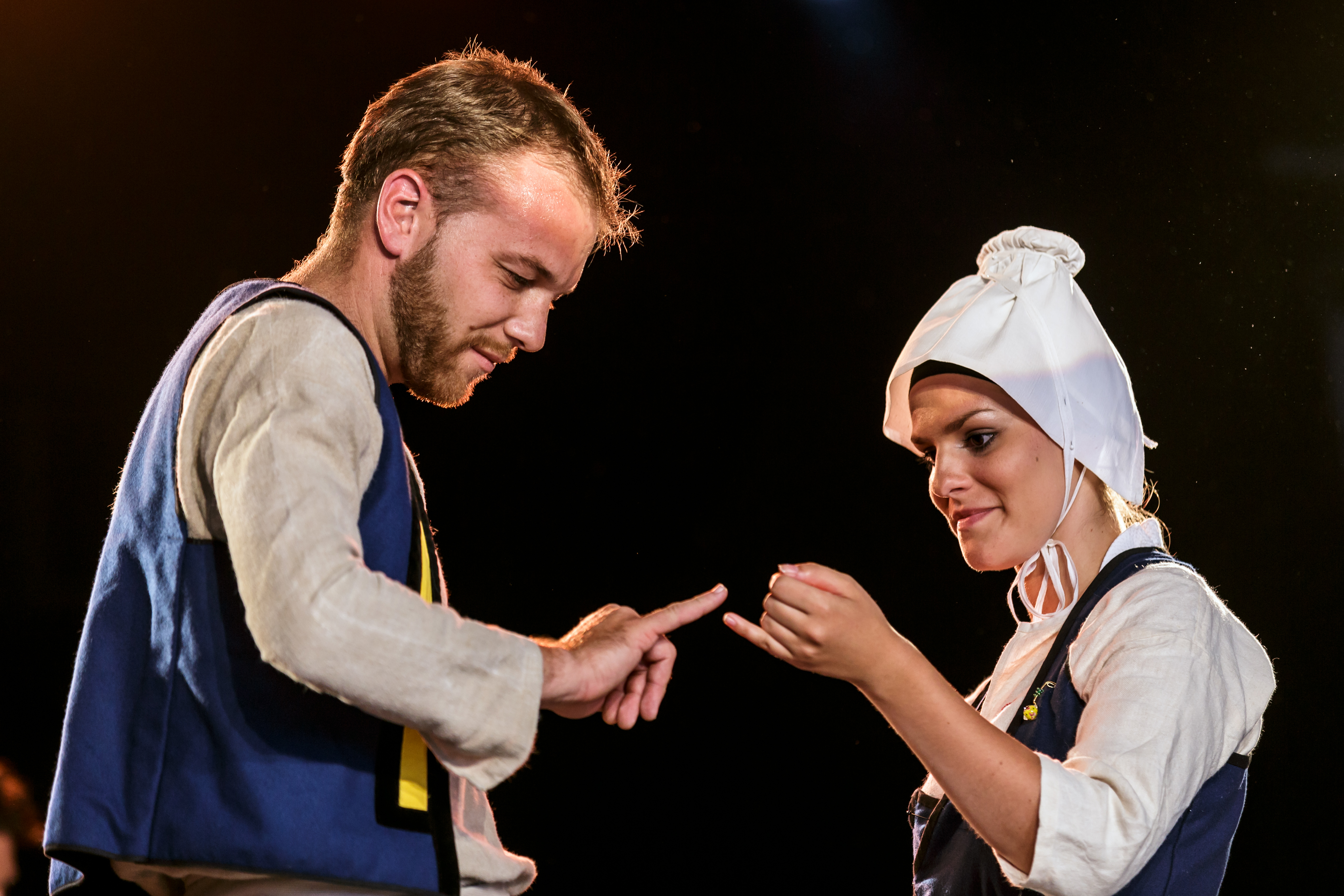 Spectacle D-Dao, création 2016 du cercle celtique Eostiged ar Stangala, champion de Bretagne 2016, lors du Festival de Cornouaille à Quimper le dimanche 24 juillet 2016.